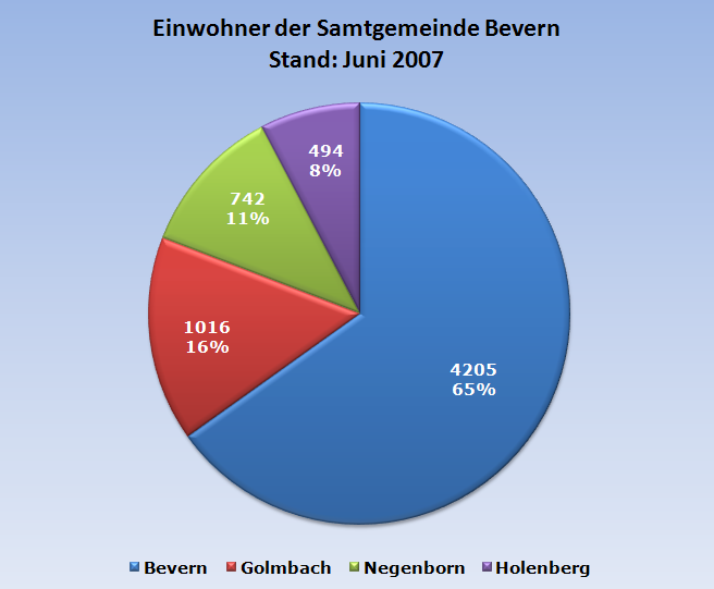 Bevölkerungstatistik: Einwohnerstand der Mitgliedsgemeinden der Samtgemeinde Bevern zum 30. Juni 2007 nach Datenstand des Niedersächsischen Landesamtes für Statistik (NLS).